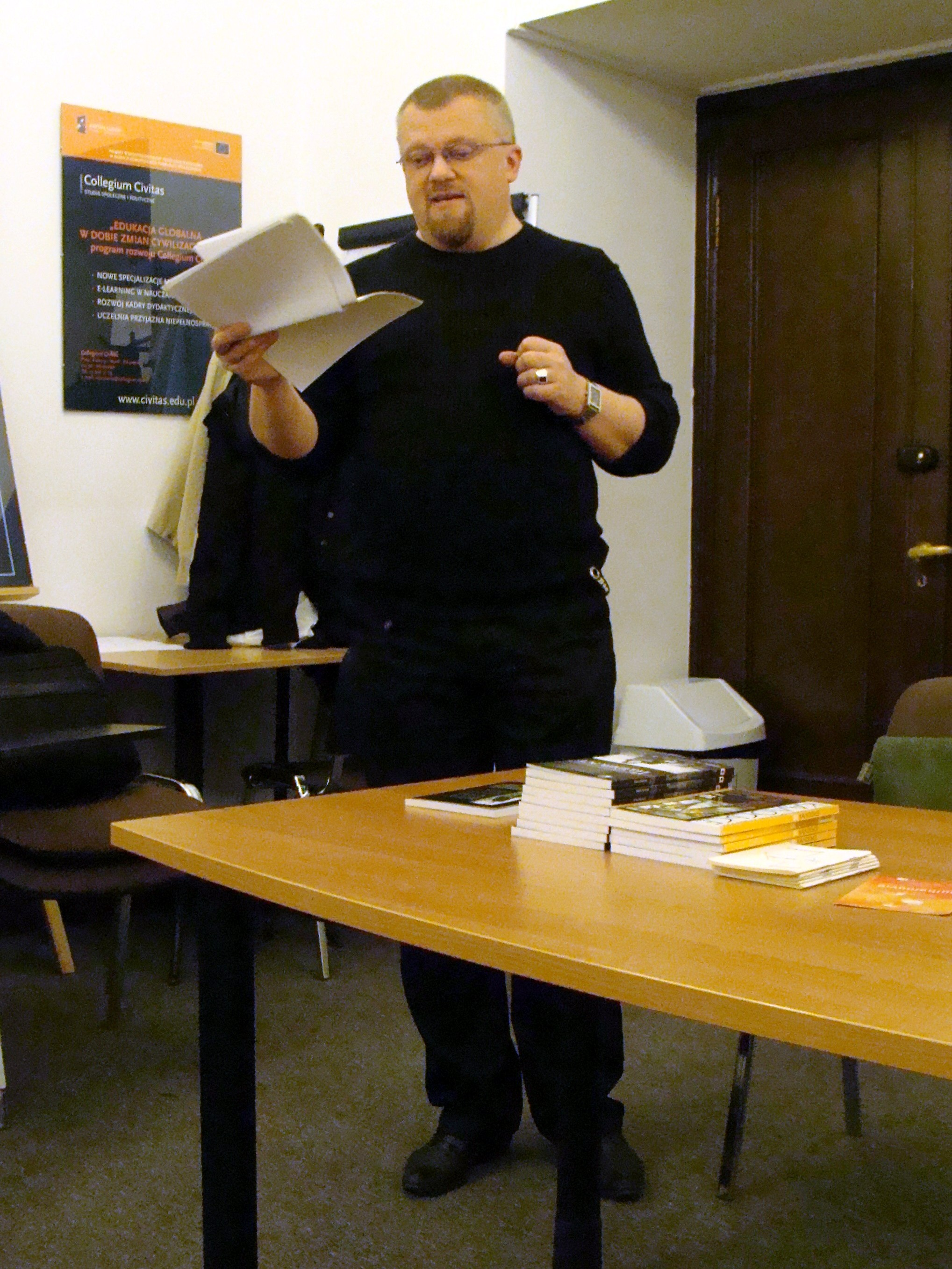 Juryj Humianiuk recytuje swój wiersz w czasie spotkania na uniwersytecie Collegium Civitas w Pałacu Kultury i Nauki w Warszawie.